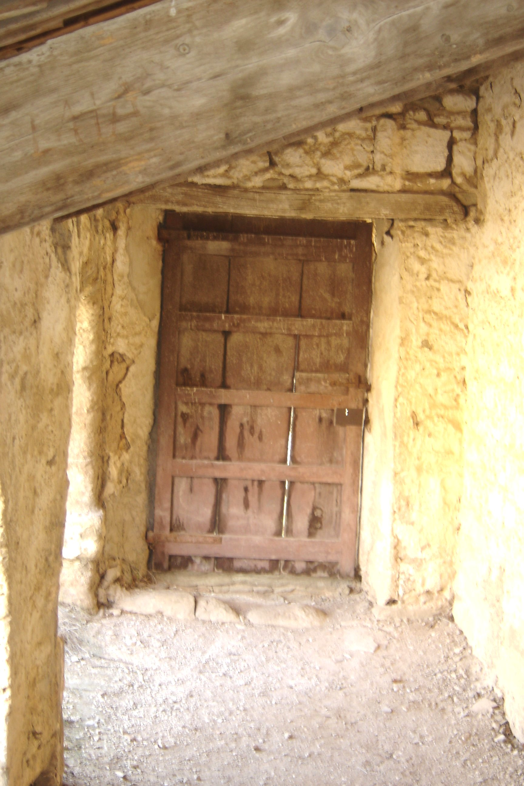 L'ermita de Sant Lleïr de Casabella, al municipi de La Coma i la Pedra, a la Vall de Lord (Solsonès). La porta d'accès al recinte que s'obre a la façana oriental vista des de l'interior del porxo